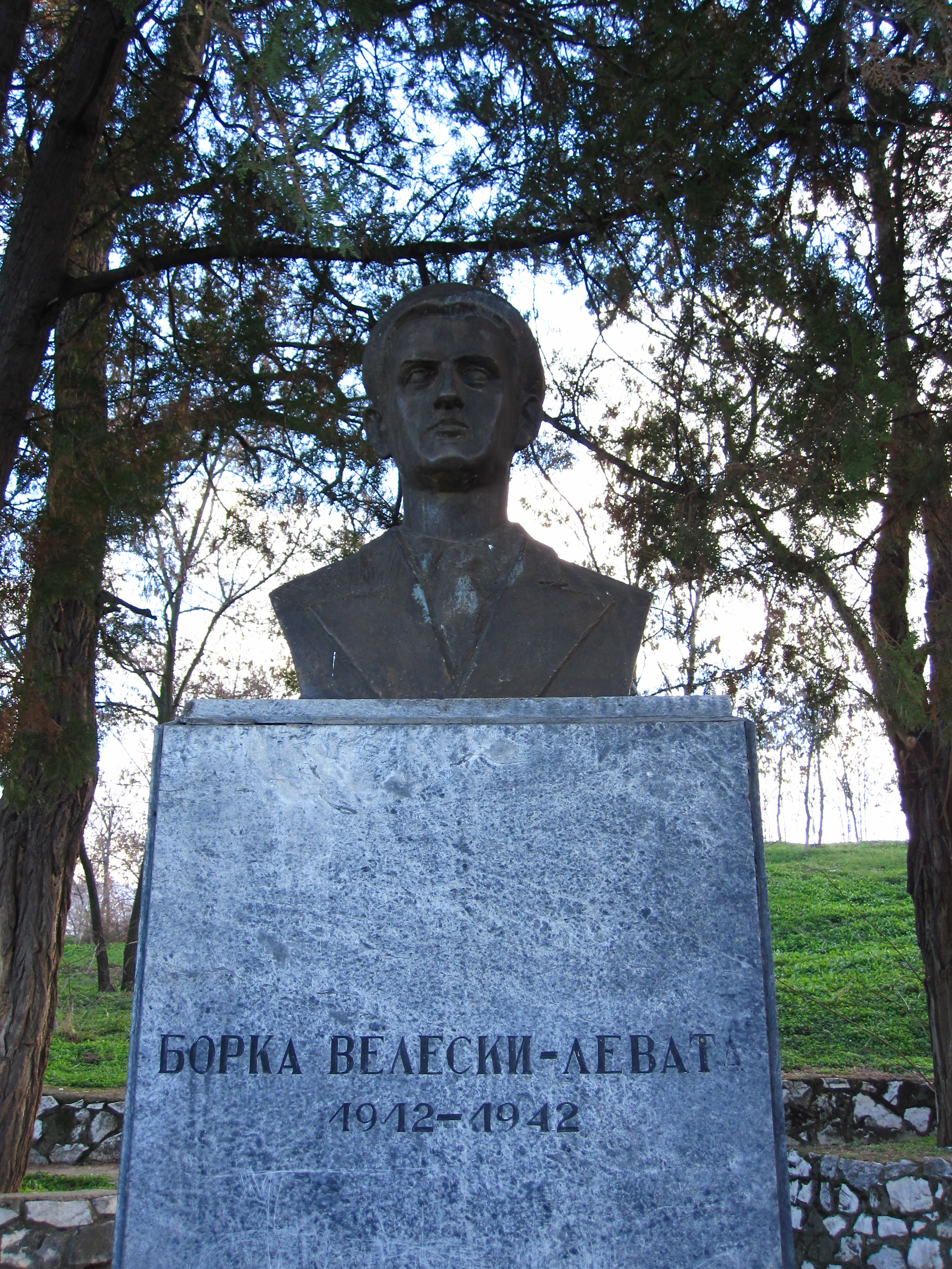 Биста - Борка Велески - Левата - Прилеп